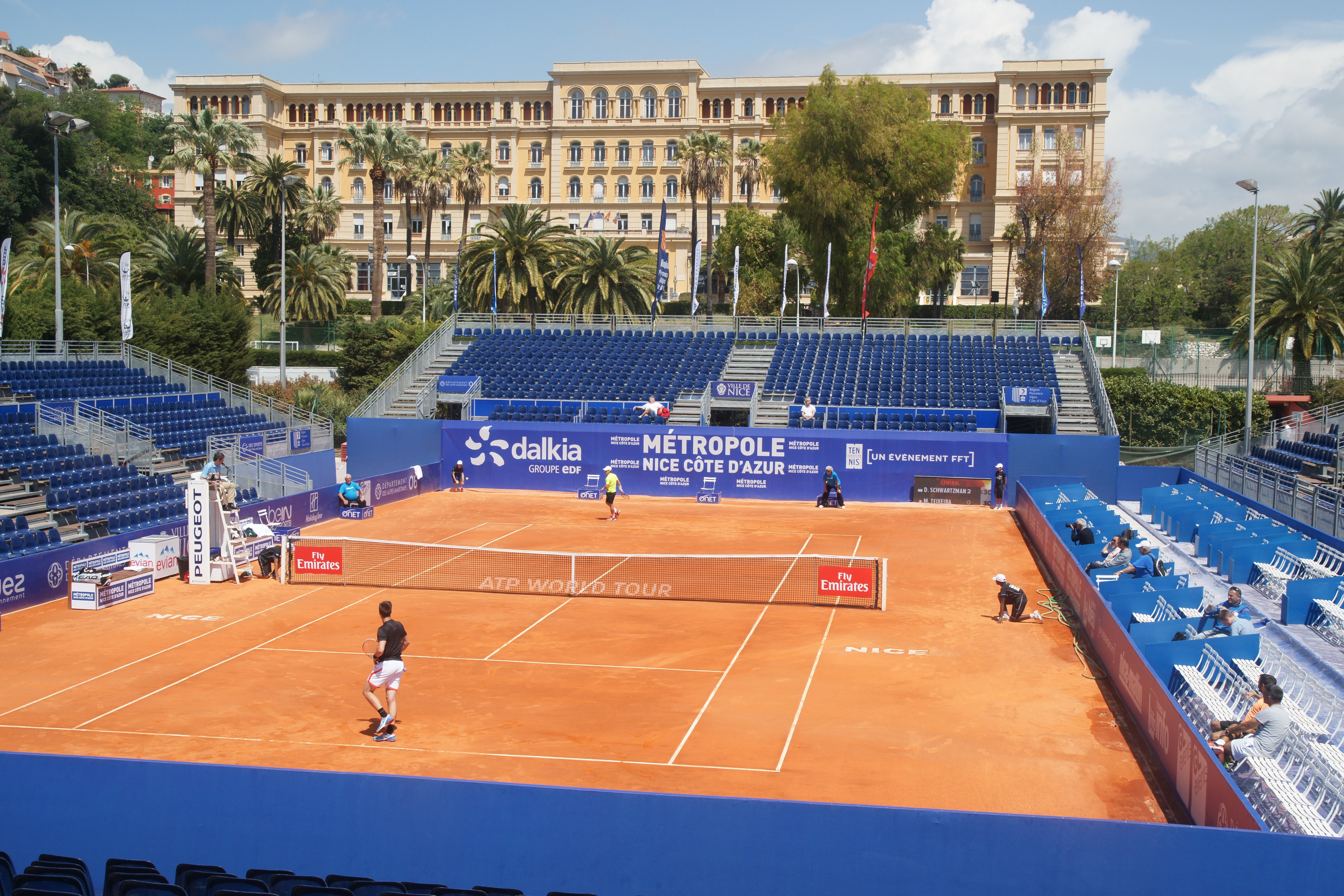 court central Open Nice 2016